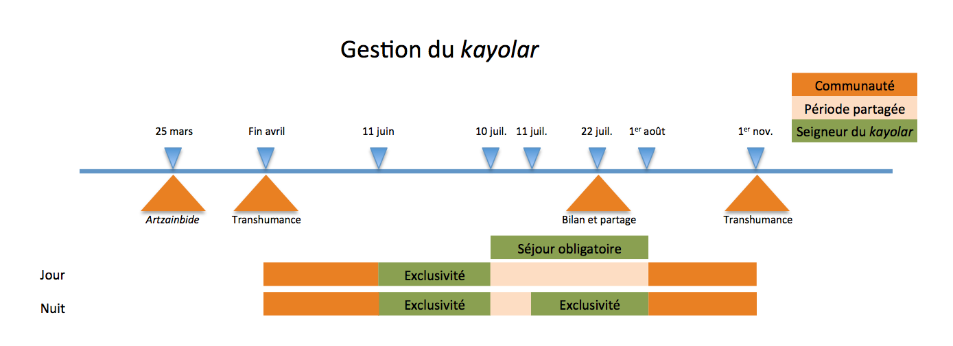 Gestion du kayolar entre les périodes de transhumance dans la province de Soule